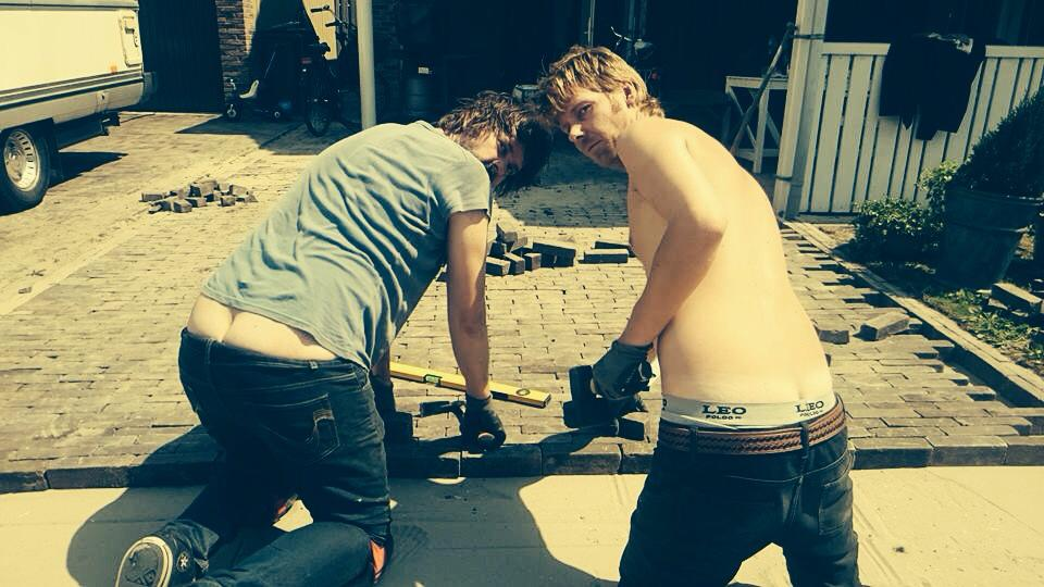 Stratenmakers bezig tijdens werkzaamheden